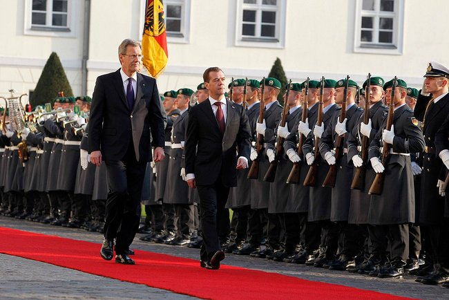 Церемония официальной встречи. С Федеральным президентом Германии Кристианом Вульфом.